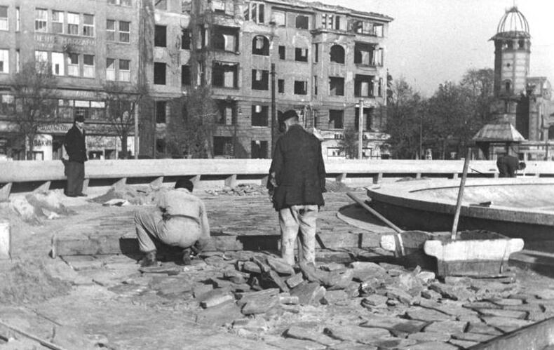 Der Reichskanzlerplatz in Berlin-Charlottenburg, der unter Kriegseinwirkungen stark gelitten hat, wird nunmehr, nachdem die Trümmer beseitigt sind, wieder in einen sauberen Zustand versetzt. In der Mitte des Platzes wird ein grosser Springbrunnen aufgebaut.